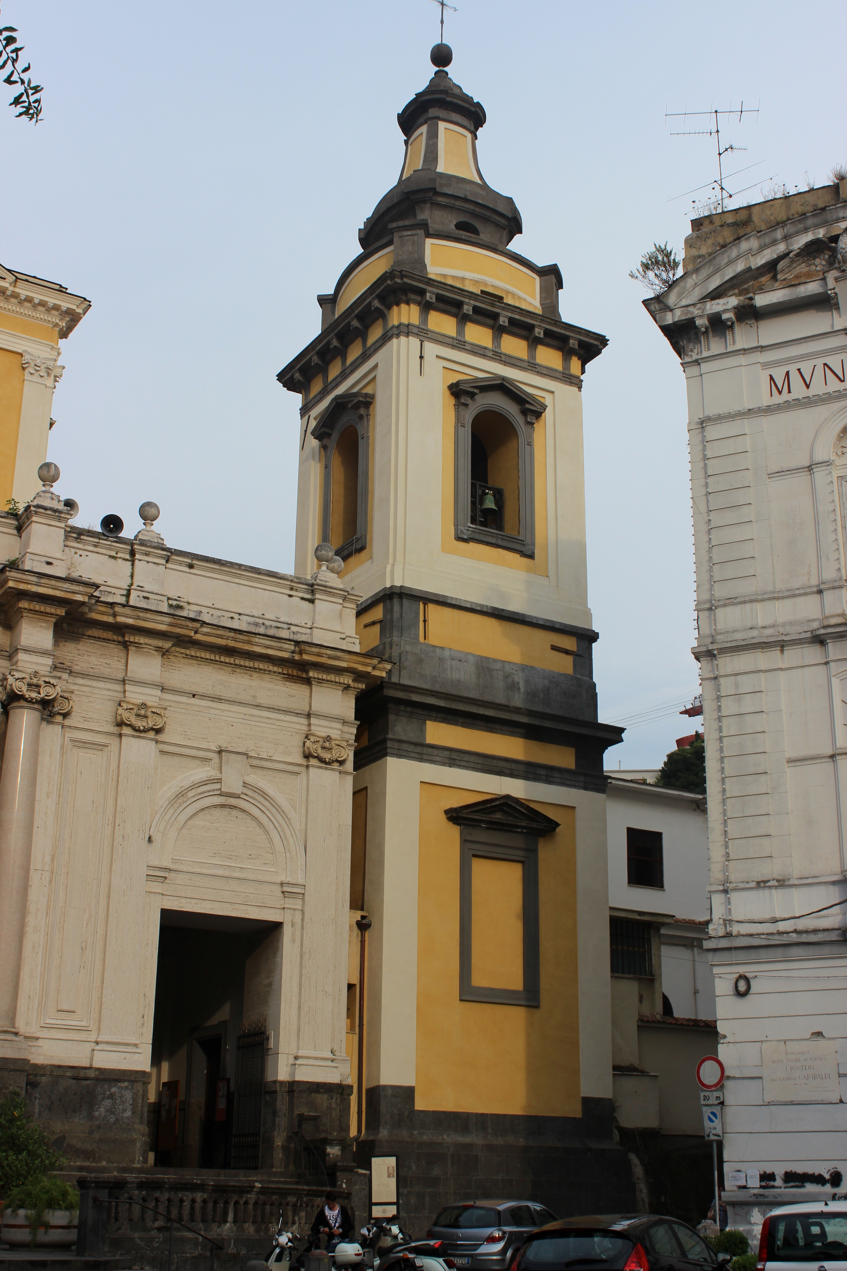 Castellammare di Stabia. Catedral.